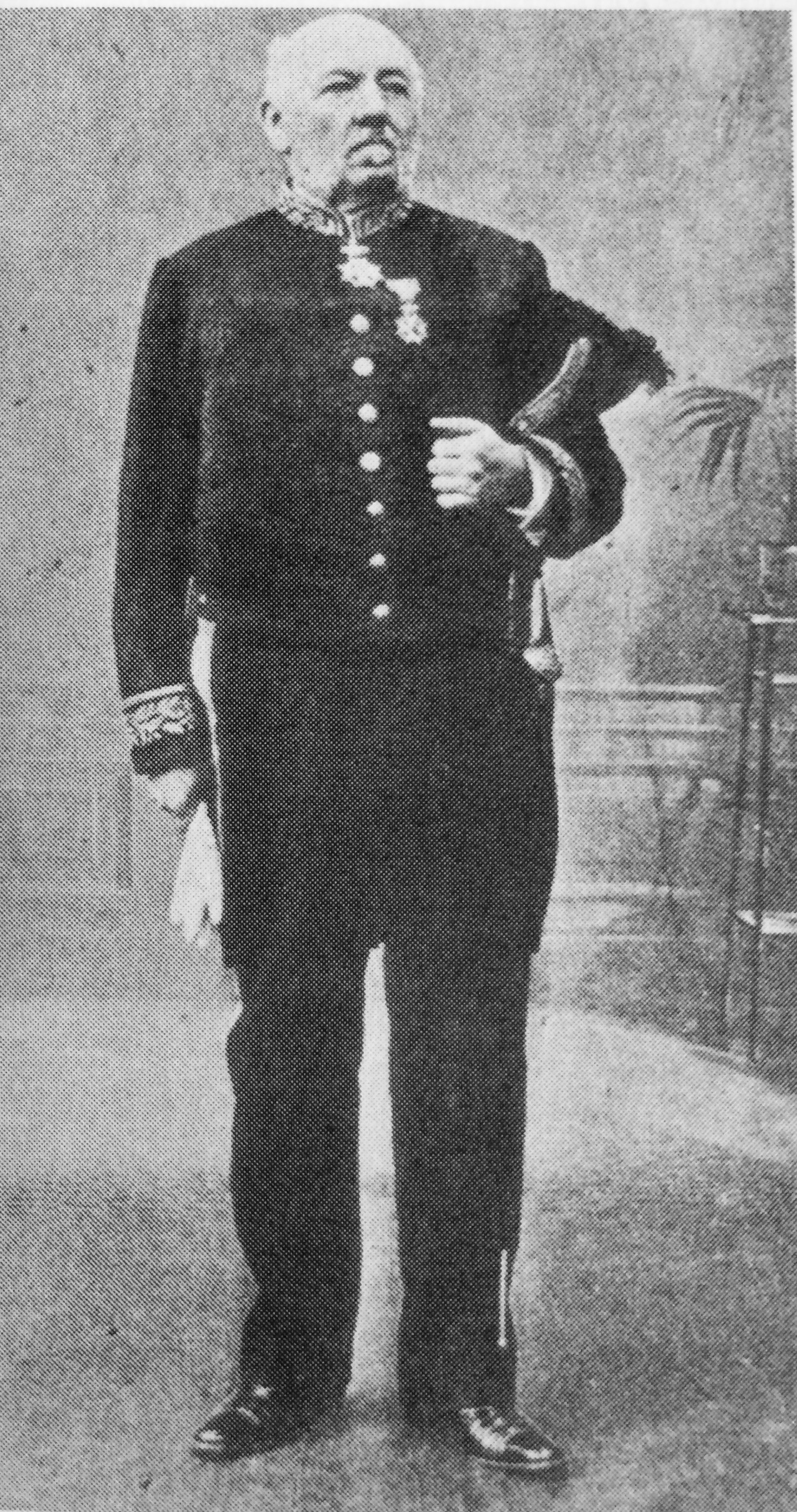 Johannes Linthorst Homan (1844-1926)